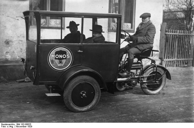 Ein neues Volksauto! Eine neuartige Wiener Motorrad-Droschke, bei welcher der Führer hinter dem Fahrgast sitzt, verspricht ein billiges Volksauto in Wien zu werden.